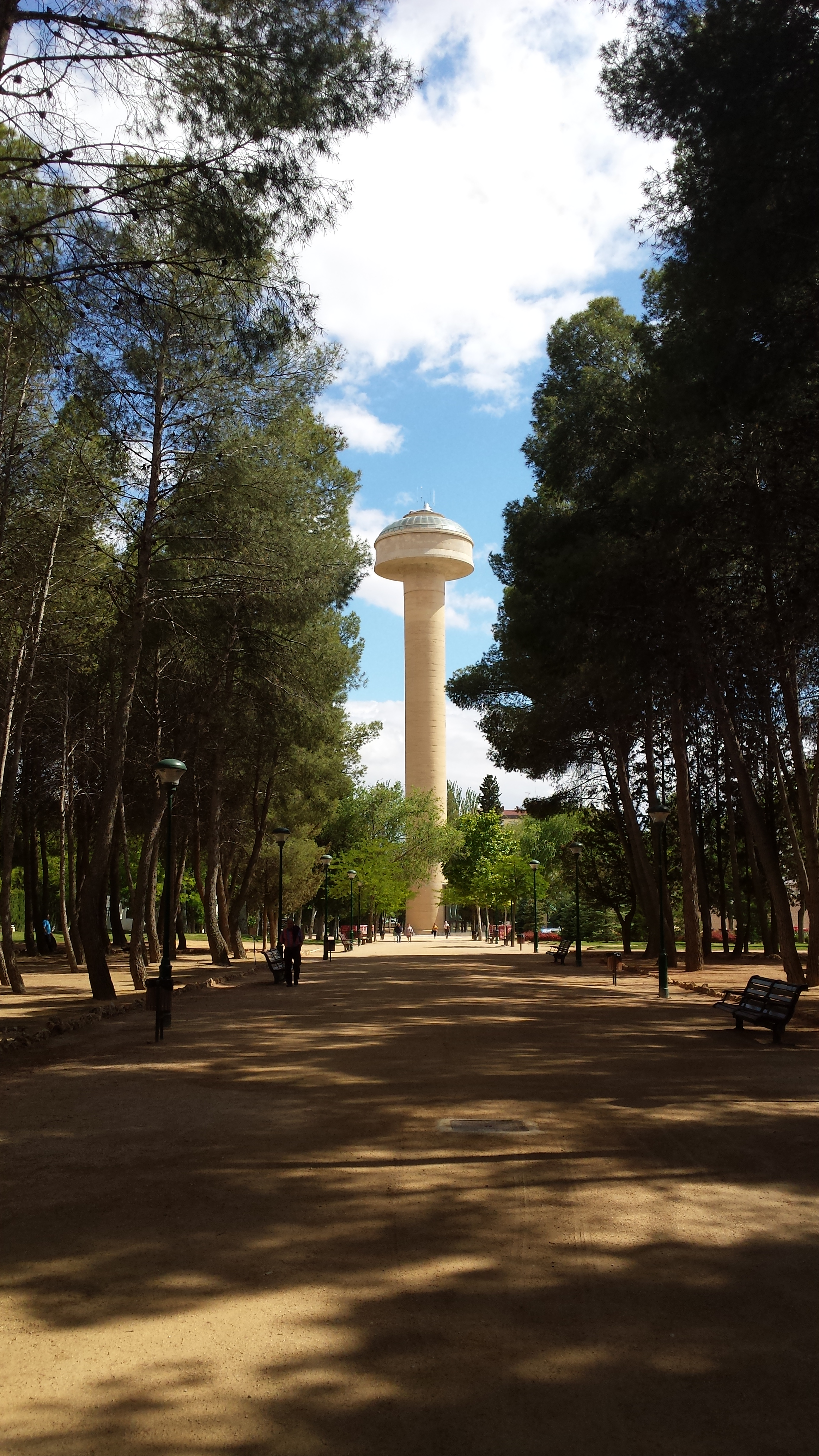 Paseo del Pinar del Parque de la Fiesta del Árbol. Depósitos del Agua de la Fiesta del Árbol. Albacete